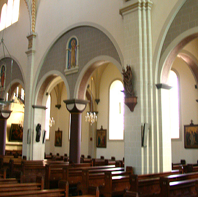 Voorbeeld van alternerend stelsel in de Sint-Martinuskerk te Beek (Nederlands Limburg).